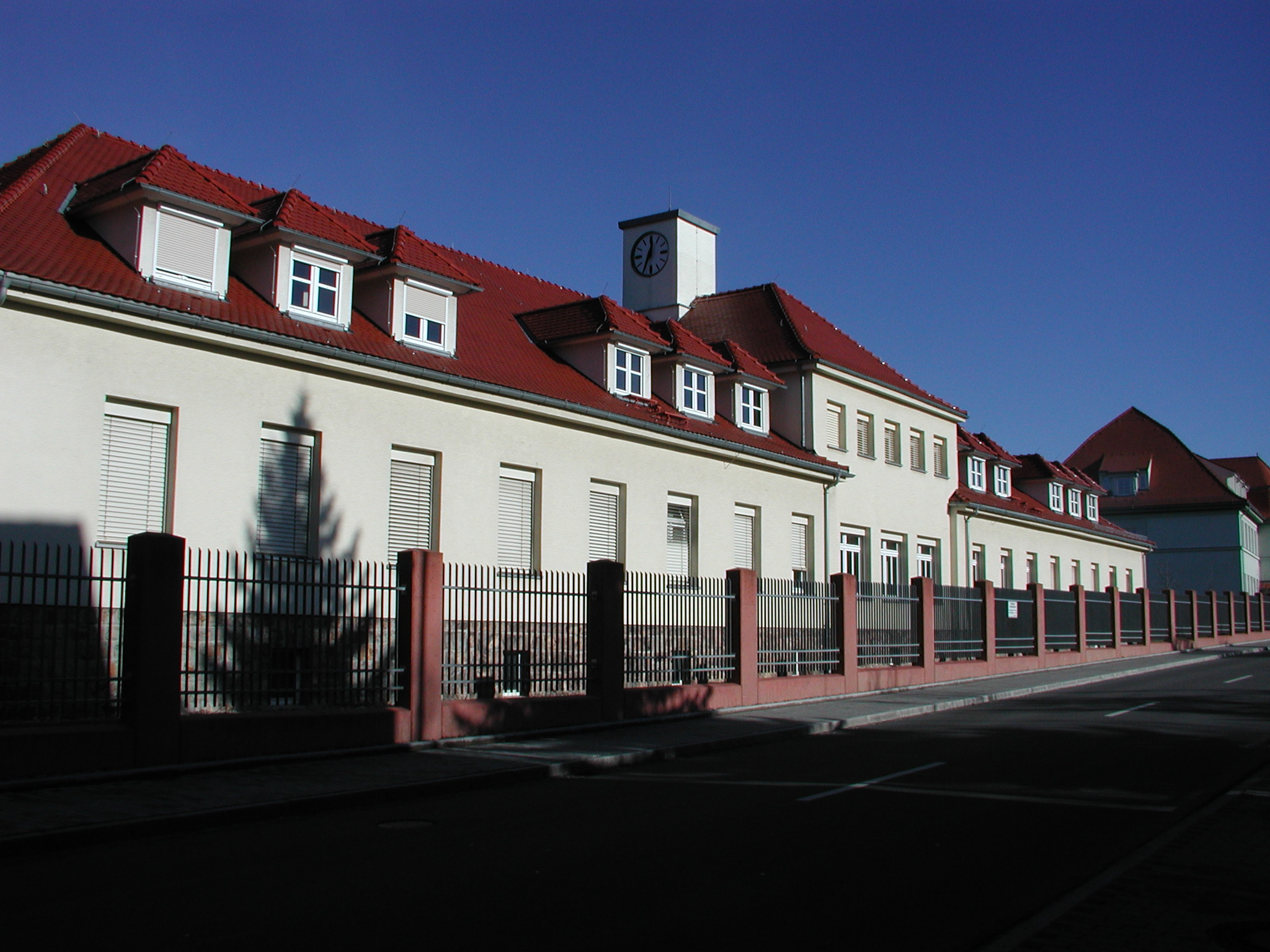 Frankenberg/Sa., einige Gebäude der „Wettiner Kaserne“